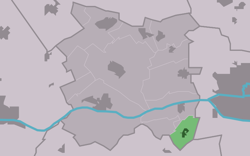 Kaartsje fan himrik fan Boksum